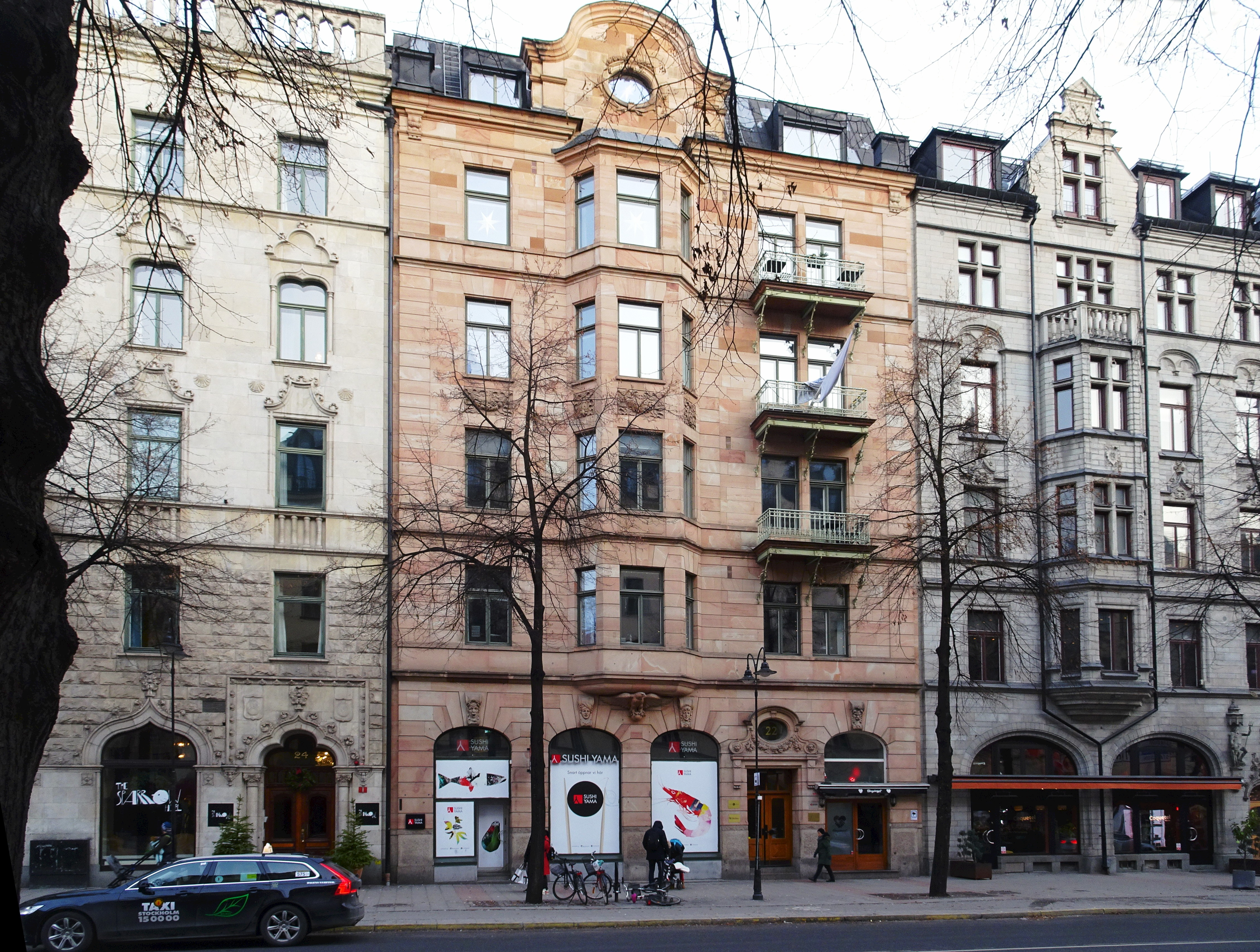 Birger Jarlsgatan 22. Byggnadsår 1897-1900, arkitekt Sam Kjellberg, byggherre Lars Östlihn.